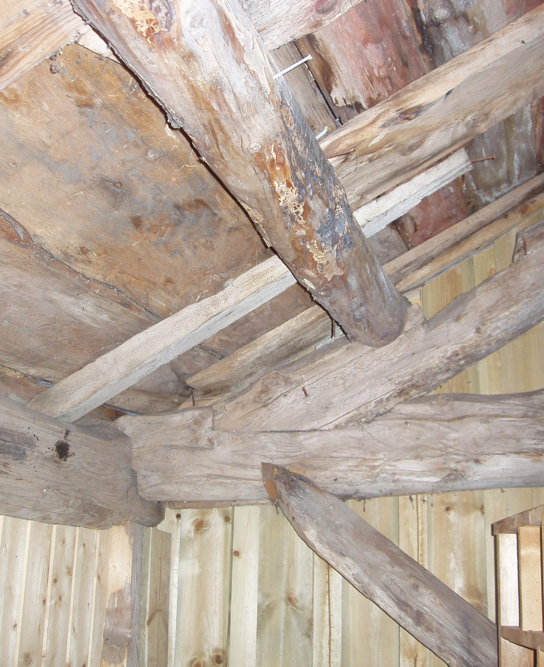 Skaftunge fotografert innanfrå